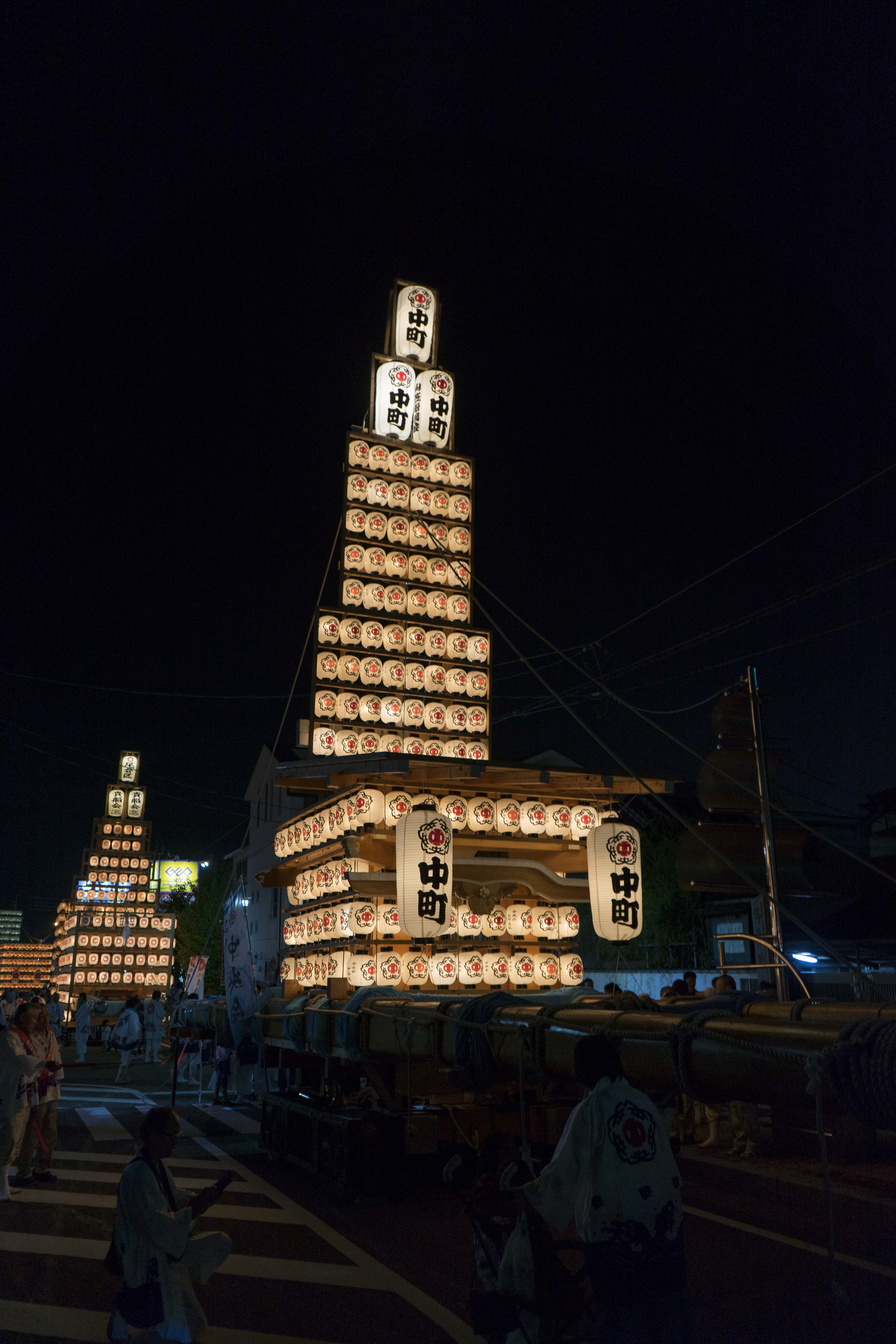 苅田山笠 中町区 灯山